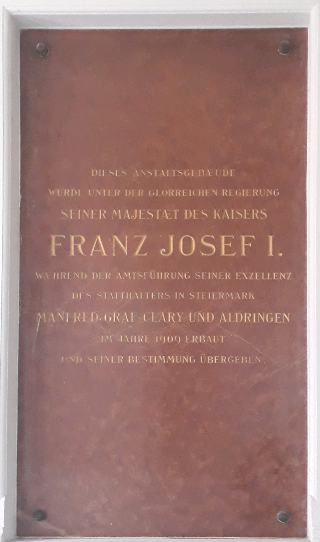 Gedenktafel in der Pädagogischen Hochschule Steiermark in Graz. Beschreibt die Erbauung des Gebäudes im Jahre 1909 unter Kaiser Franz Josef I.